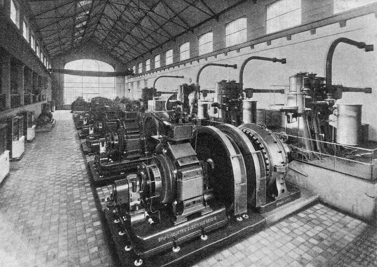 Salle des machines de l'usine de Pierre-de-Plan â Lausanne où l'énergie a été obtenue de la ligne à courant continu de Saint-Maurice. Une partie des sept groupes de convertisseurs courant continu courant triphasés est visible. Les isolateurs des fondations des machines des moteurs à courant continu nécessaires pour l'installation conçue selon le système René Thur sont clairement visibles.